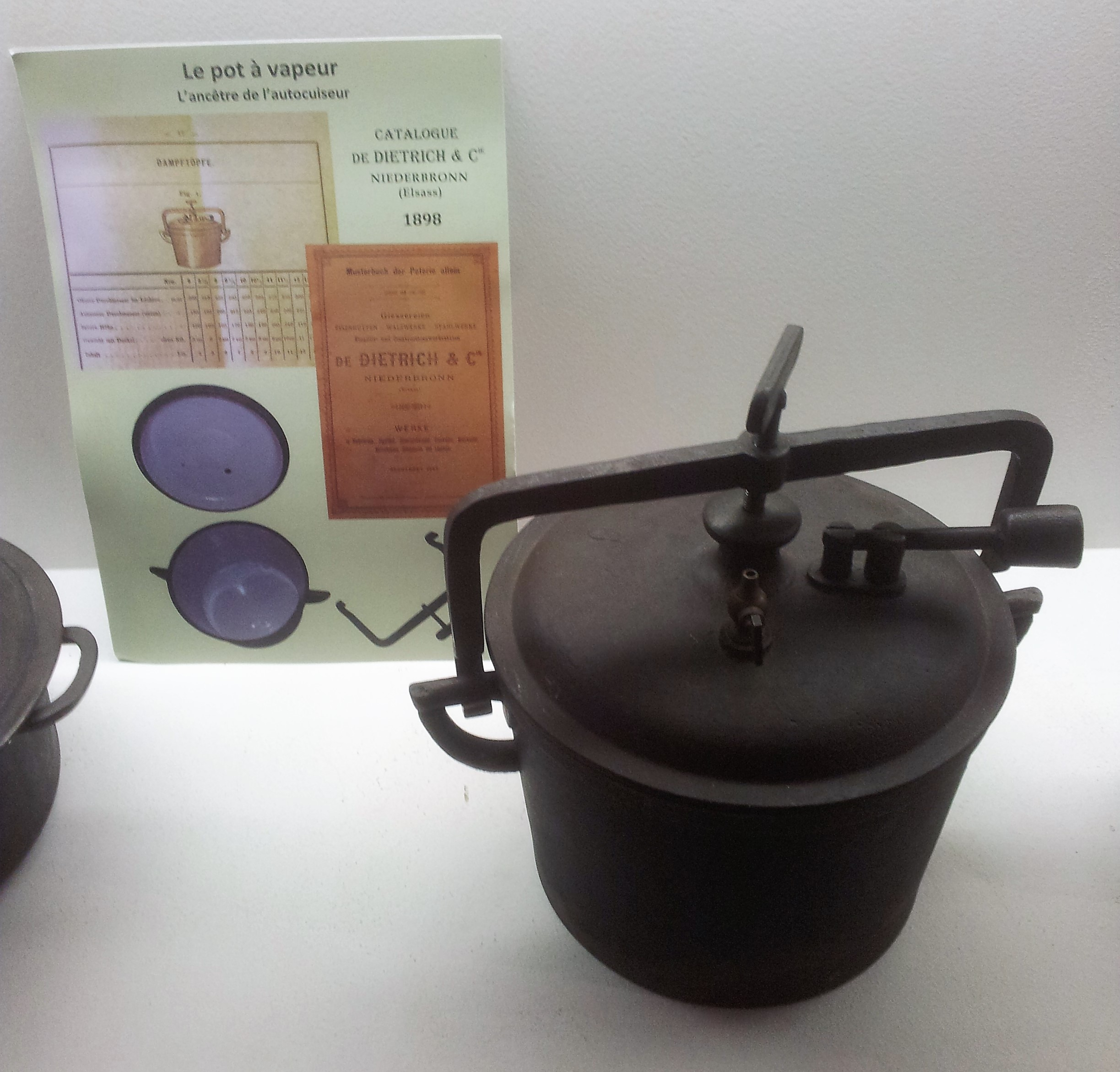 Photo d'un exemplaire d'autocuiseur De Dietrich exposé au Musée du fer de Reichshoffen (Alsace), au catalogue en 1898 sous le nom de "Dampftopf".